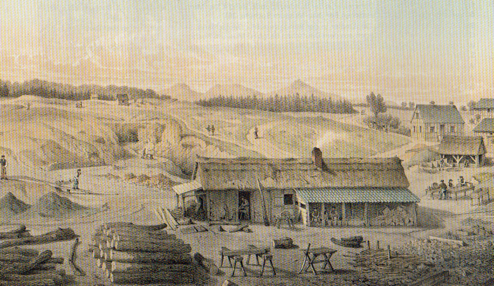 Betriebsanlagen der Grube Altglück